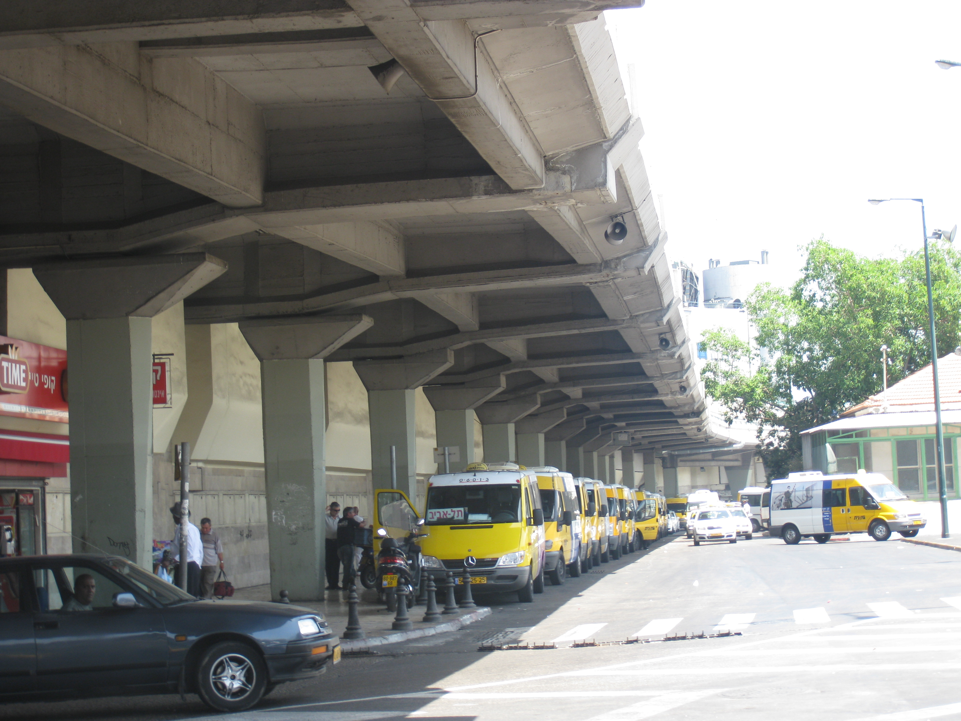 Tel Aviv New Central Bus Station התחנה המרכזית החדשה בתל אביב